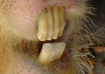 Schneidezähne eines Capybara